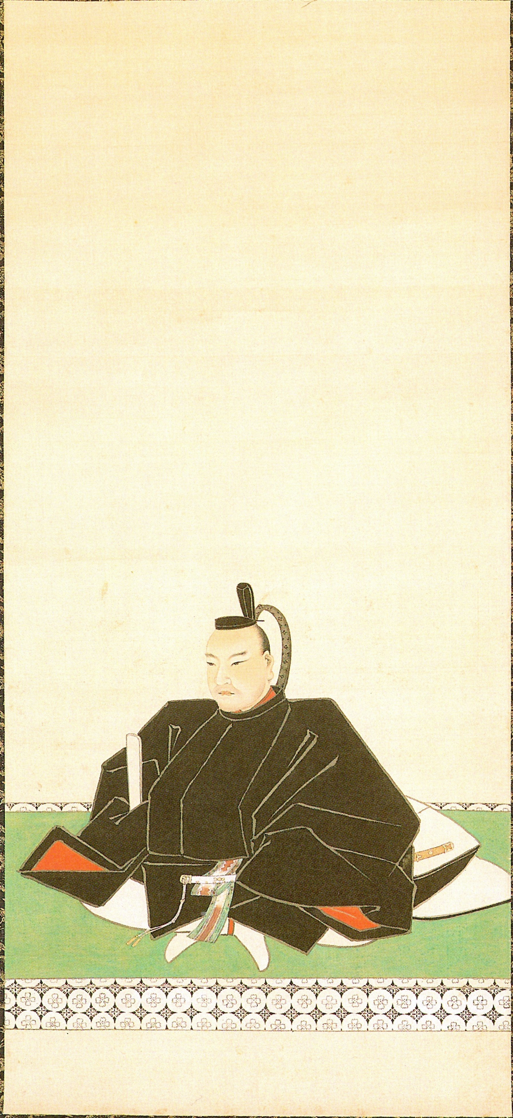 井伊直元の肖像。